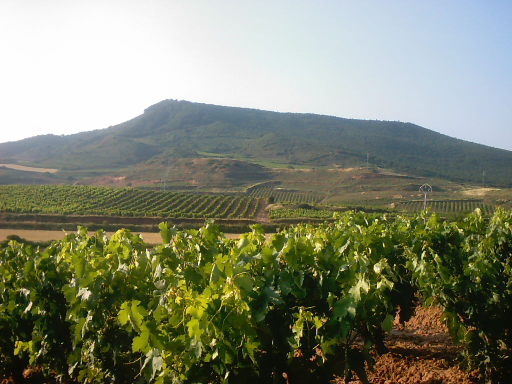 Paisaje y viñedos en Ventosa (La Rioja). España